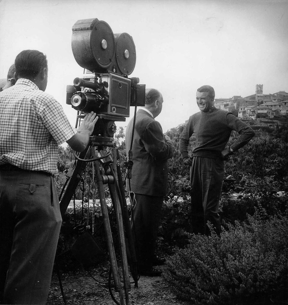 Photo of Alfred Hitchcock & Cary Grant taken for film To Catch a Thief (1955). See also film still. No copyright notice.